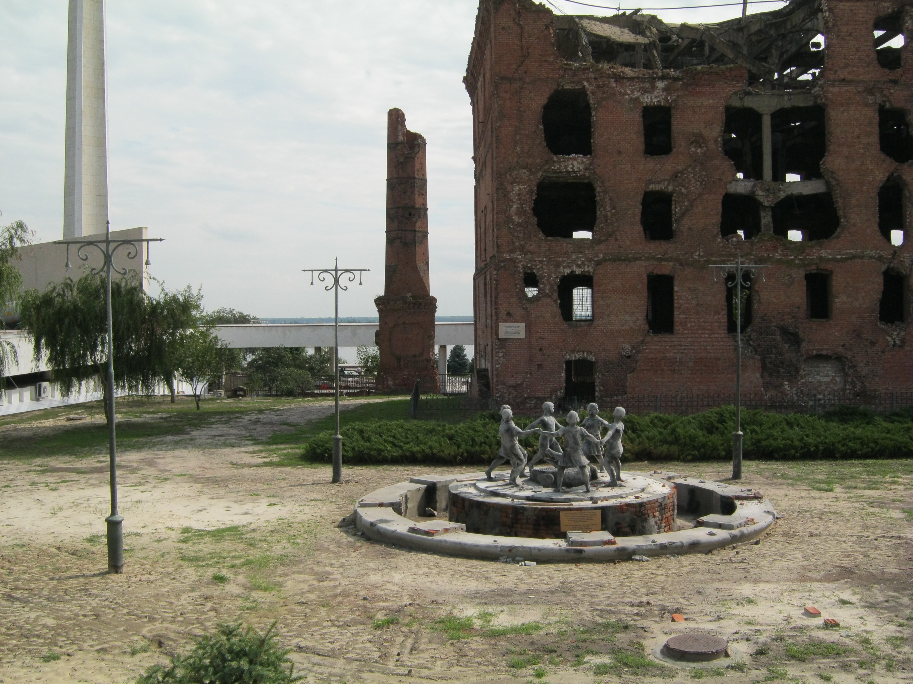 Реплика фонтана Бармалей